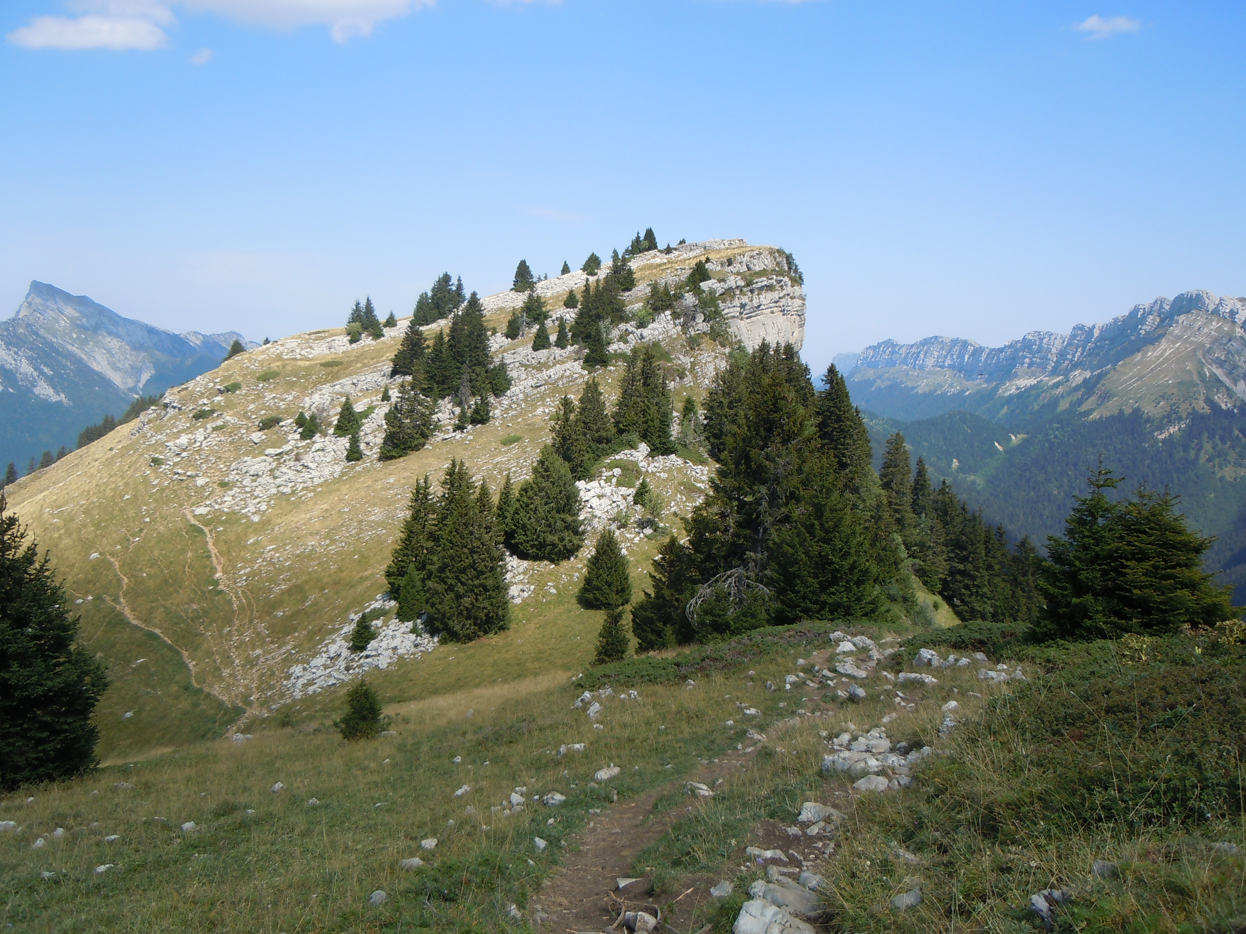 Roc d'Arguille vue depuis le Mont Pravouta - Isère - France